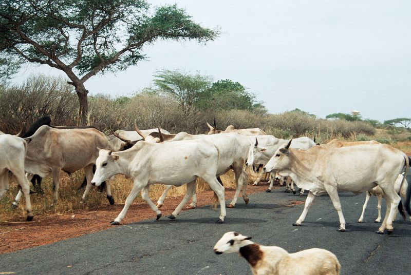 Troupeau aux environs de Potou (Sénégal)